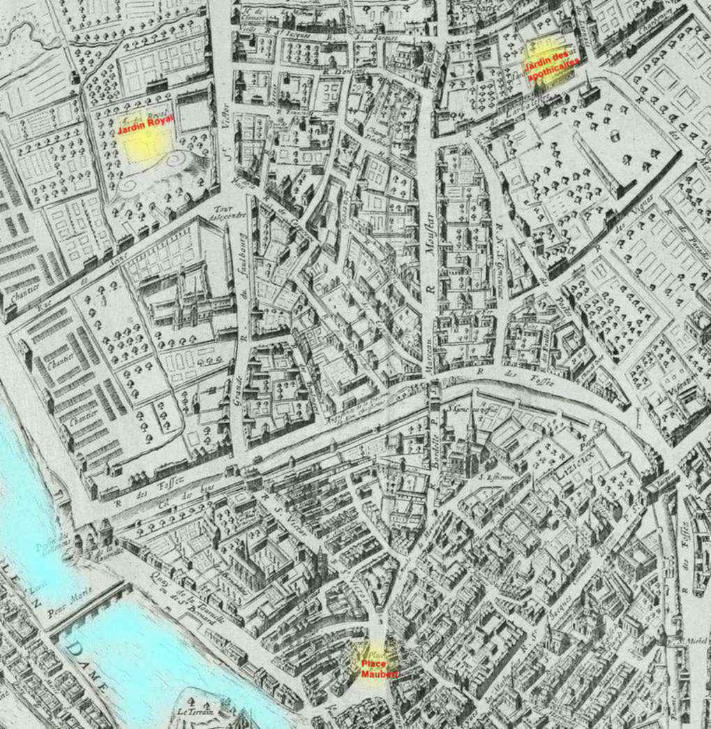 Section du plan de Paris de Boisseau 1654, situant le Jardin royal, le Jardin des Apothicaires et la Place Maubert. Le nord est situé à gauche, l'est en haut de la feuille.